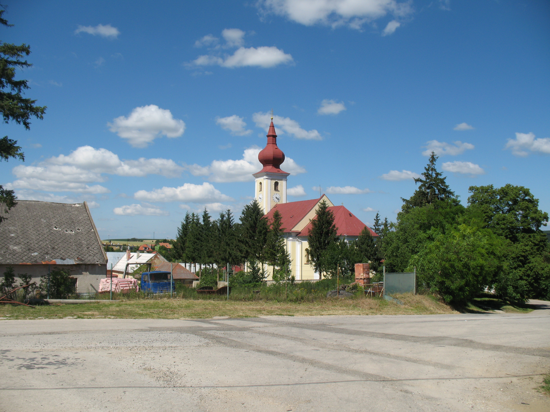 Üreg falu